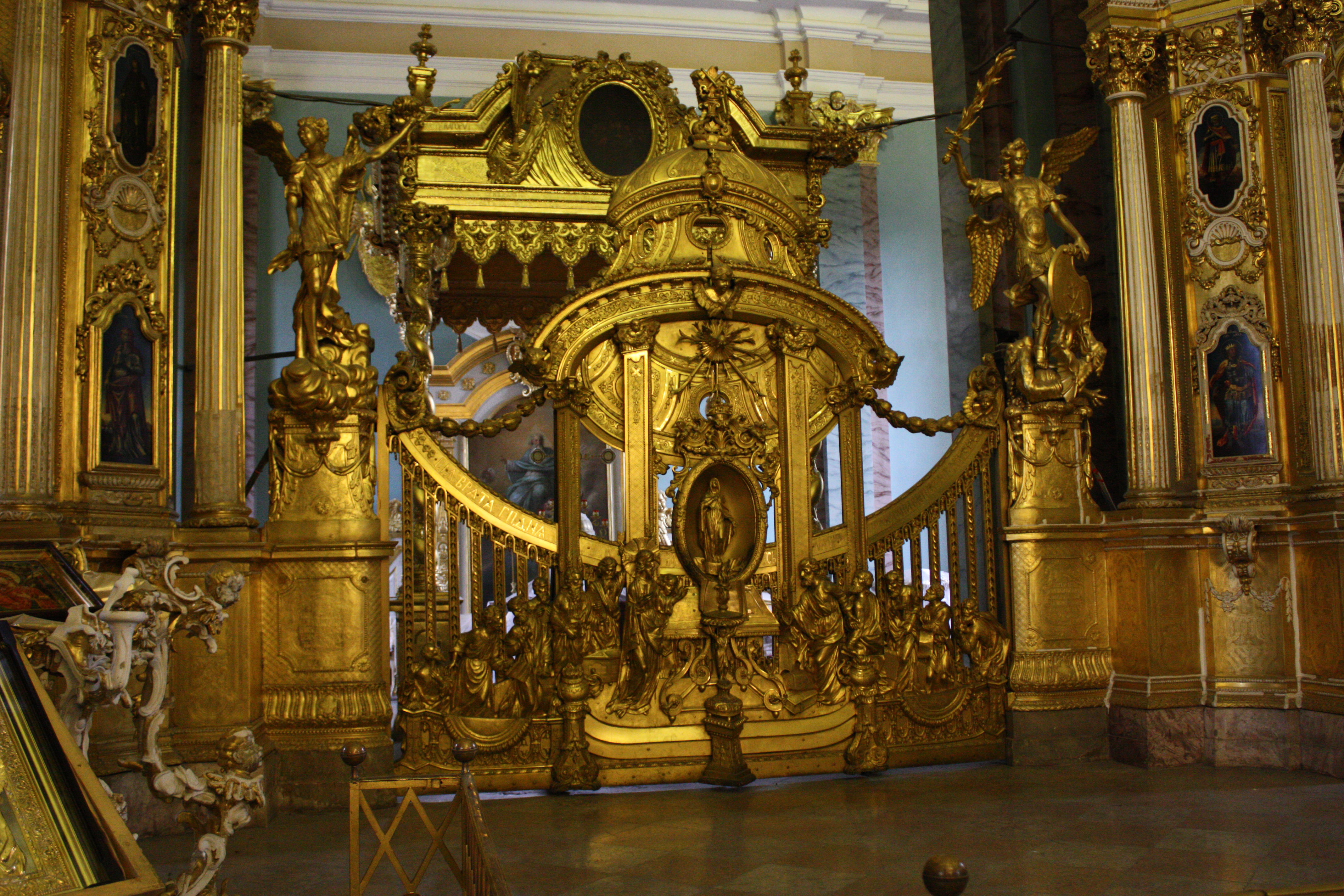 Peter und Paul Kathedrale Sankt Petersburg 2009 Touristenbilder